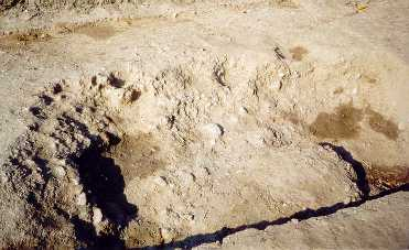 Hüttenfundament Ausgrabung 2002 Lamplfeld